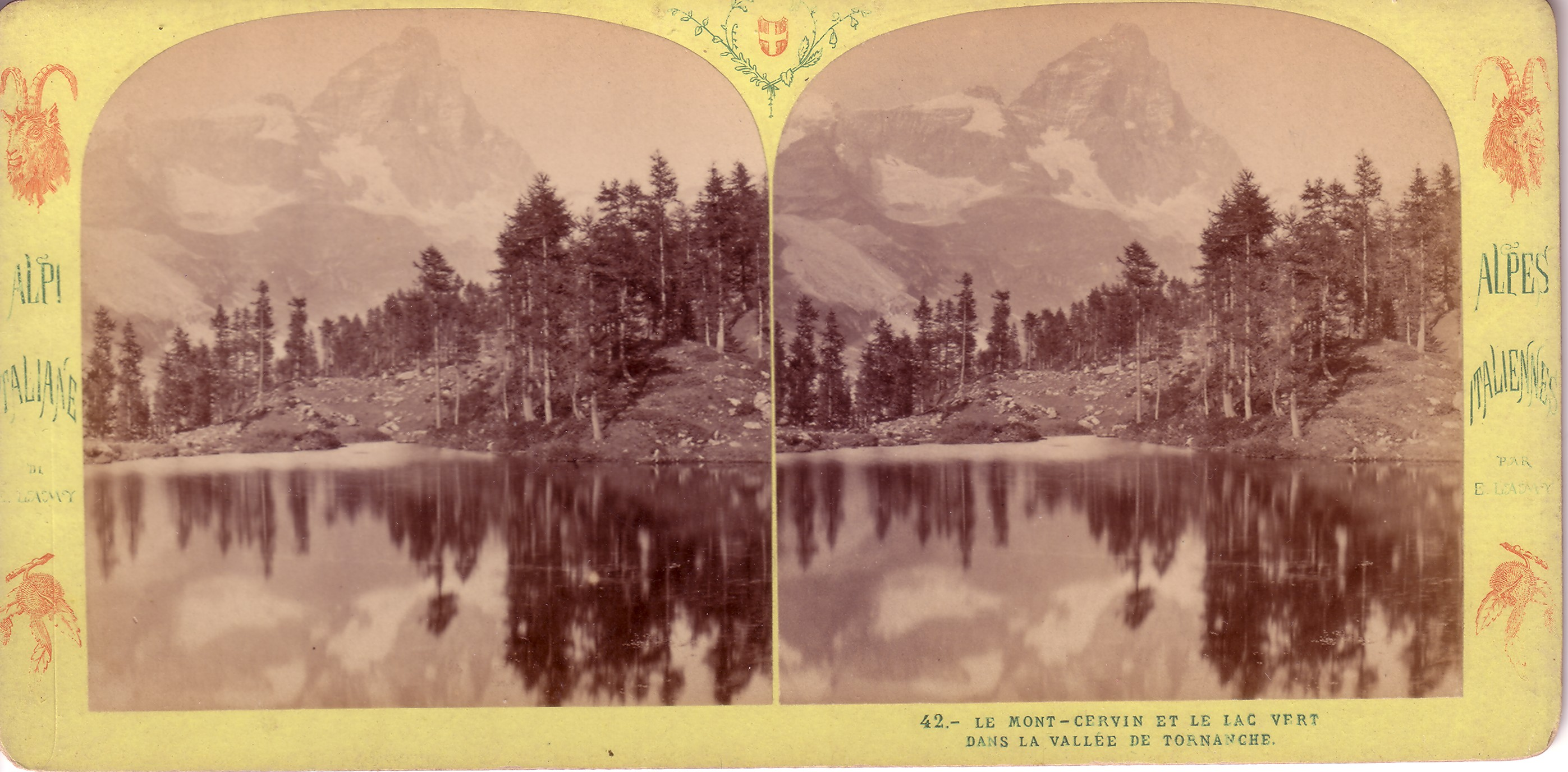 Stereophotographie von E. Lamy aus der Serie "Alpi italiane", "Alpes italiennes"